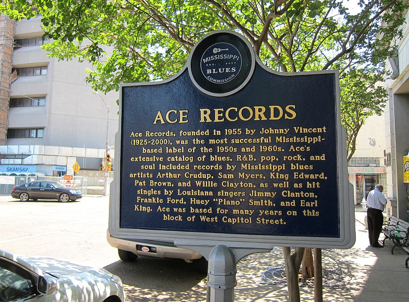 Mississippi Blues trail marker am Ort des ehemaligen Sitzes von Ace Records, Jackson, Mississippi